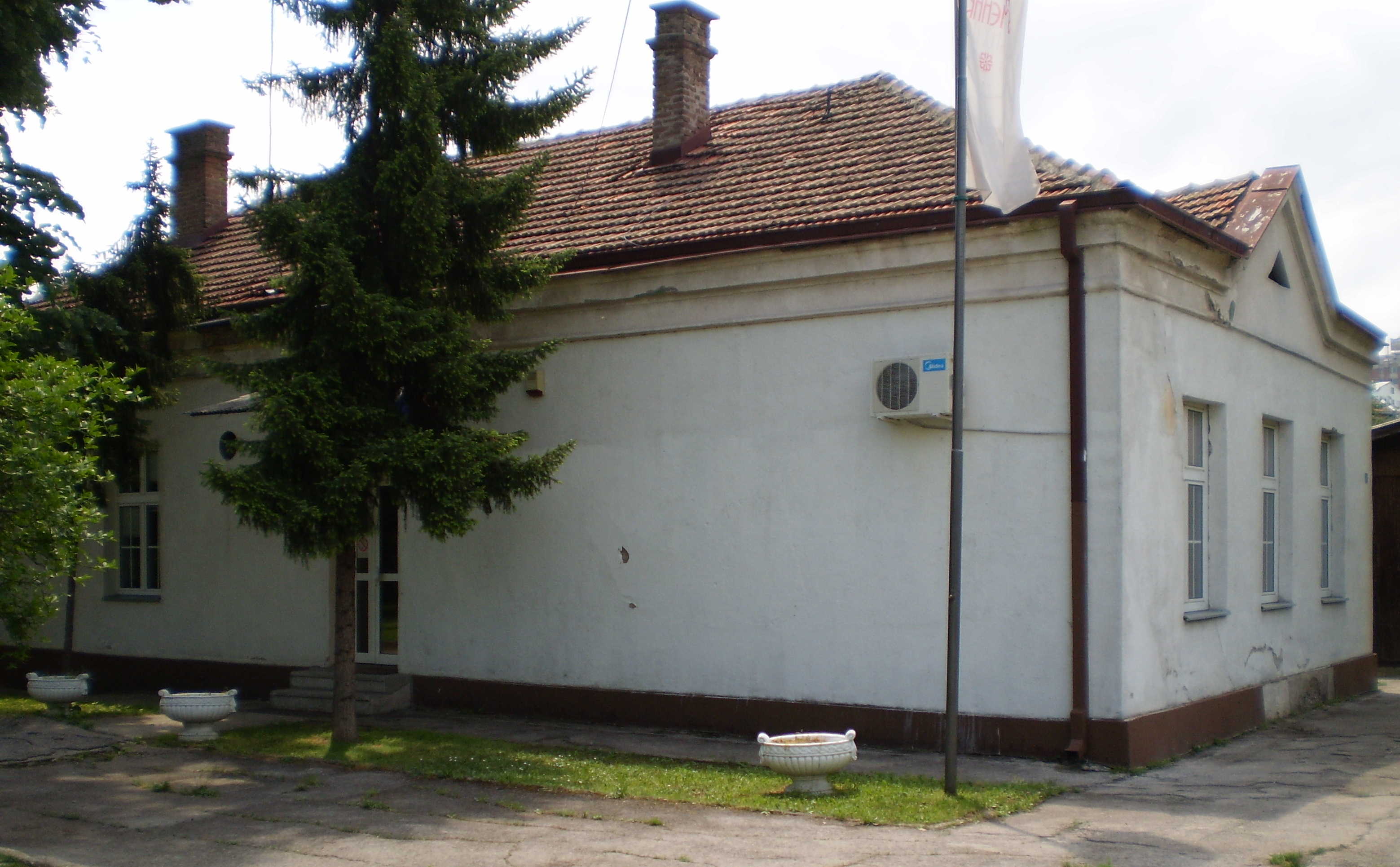 Srpski (latinica): Objekat, adaptiran za smeštaj štićenika u Domu Stevan Sinđelić, u Nišu, ranije stara škola u Jagodin-mali.